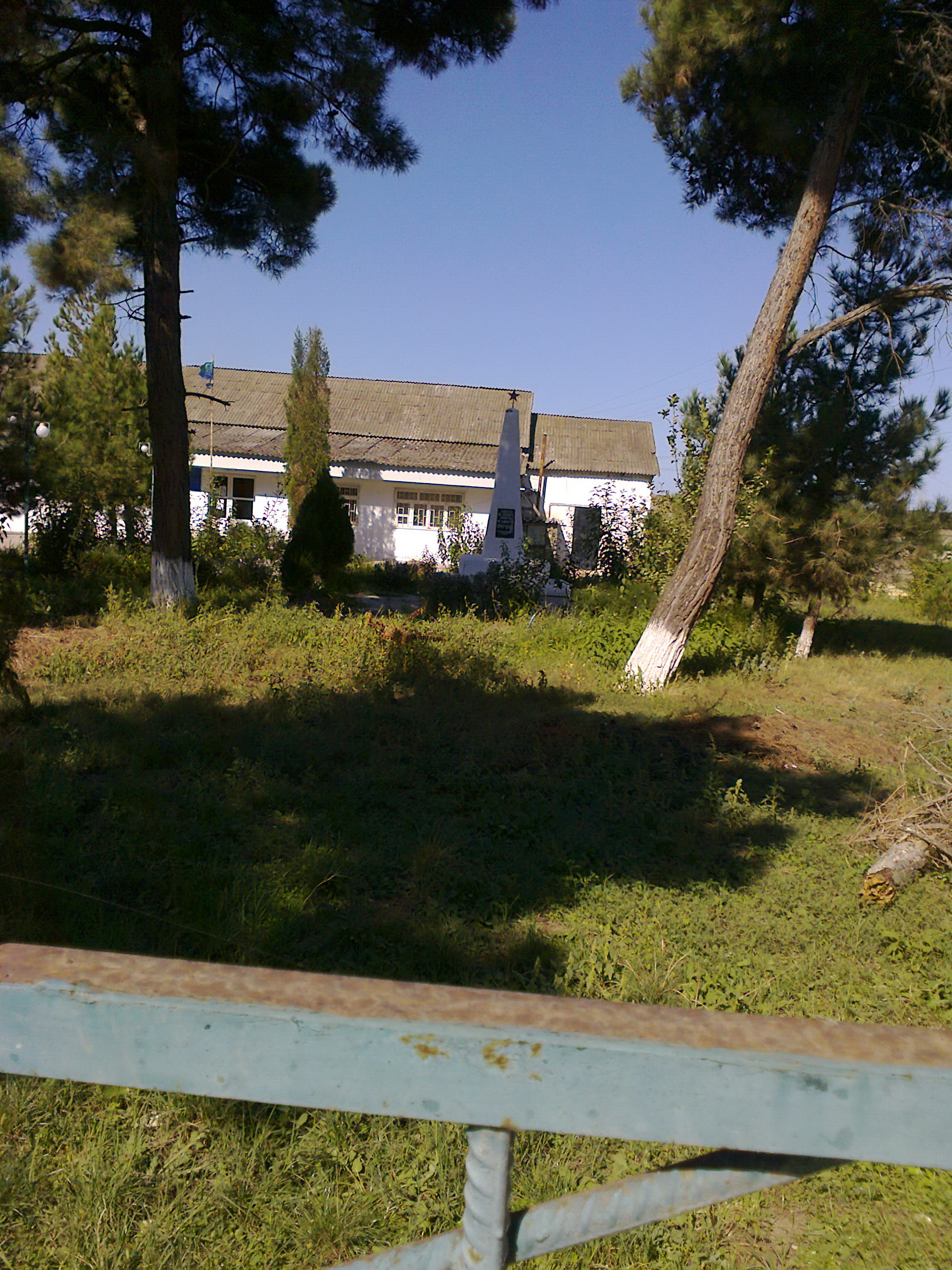 Памятник воинам, погибшим в годы ВОВ в Чинаре (находится во дворе администрации села)